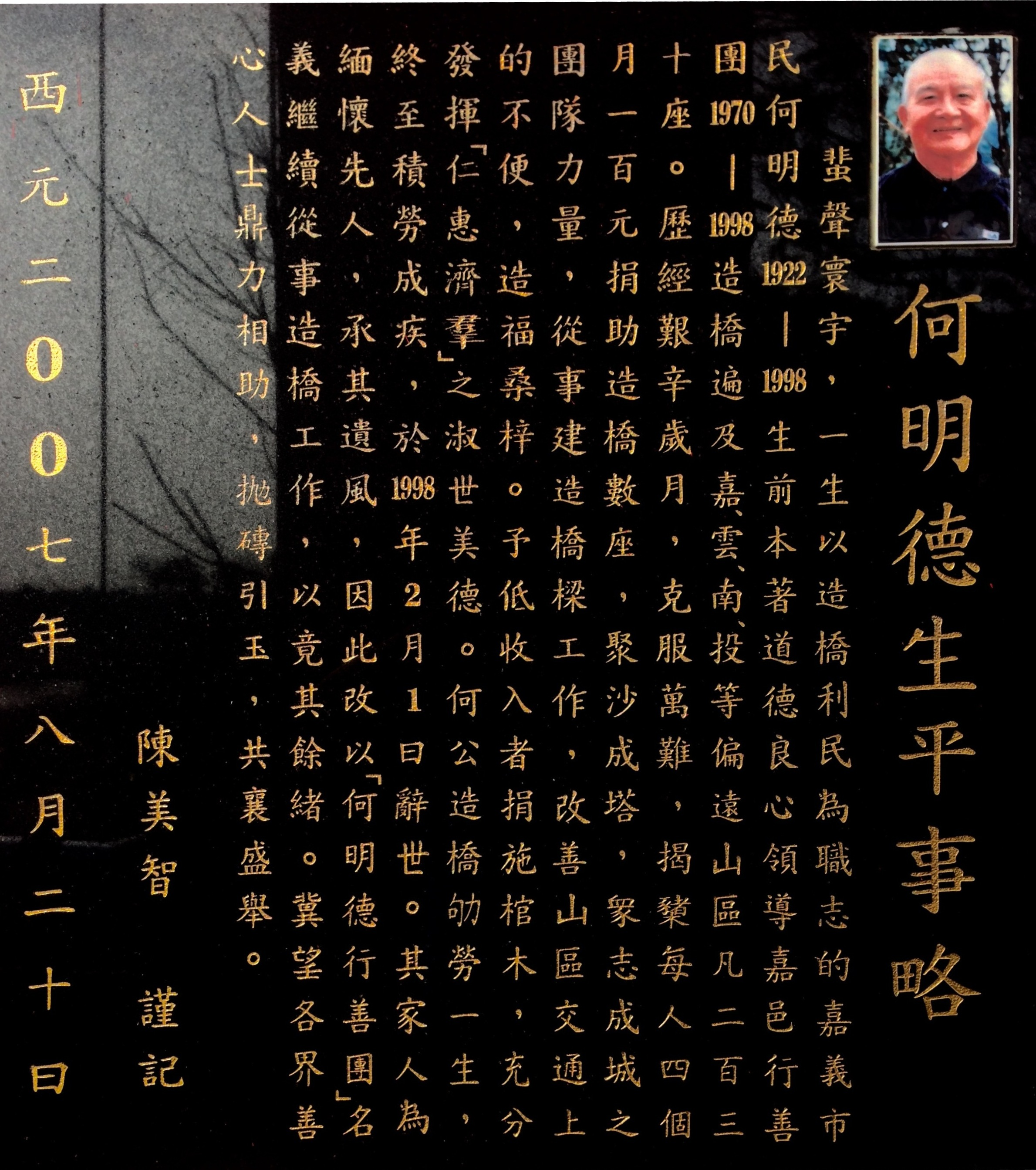 中文（台灣）: 嘉義市行嘉吊橋何明德生平事略